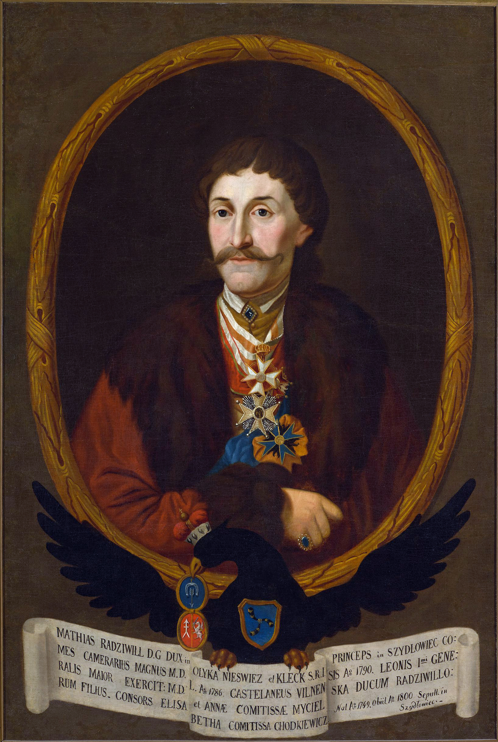 Беларуская (тарашкевіца): Партрэт Мацея Радзівіла